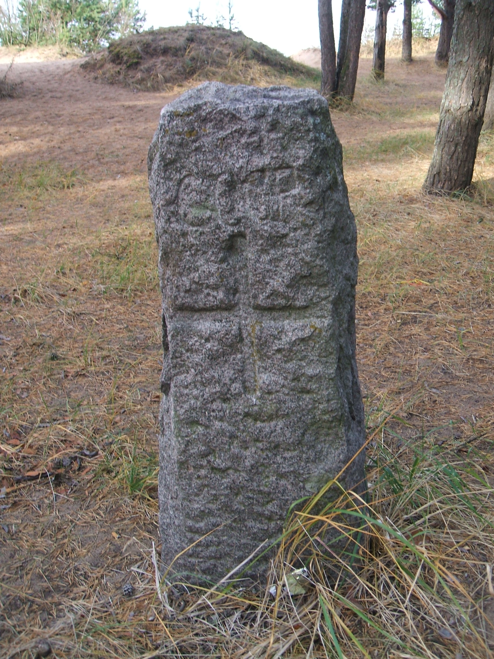 На пляже Дюна в Сестрорецке СПб